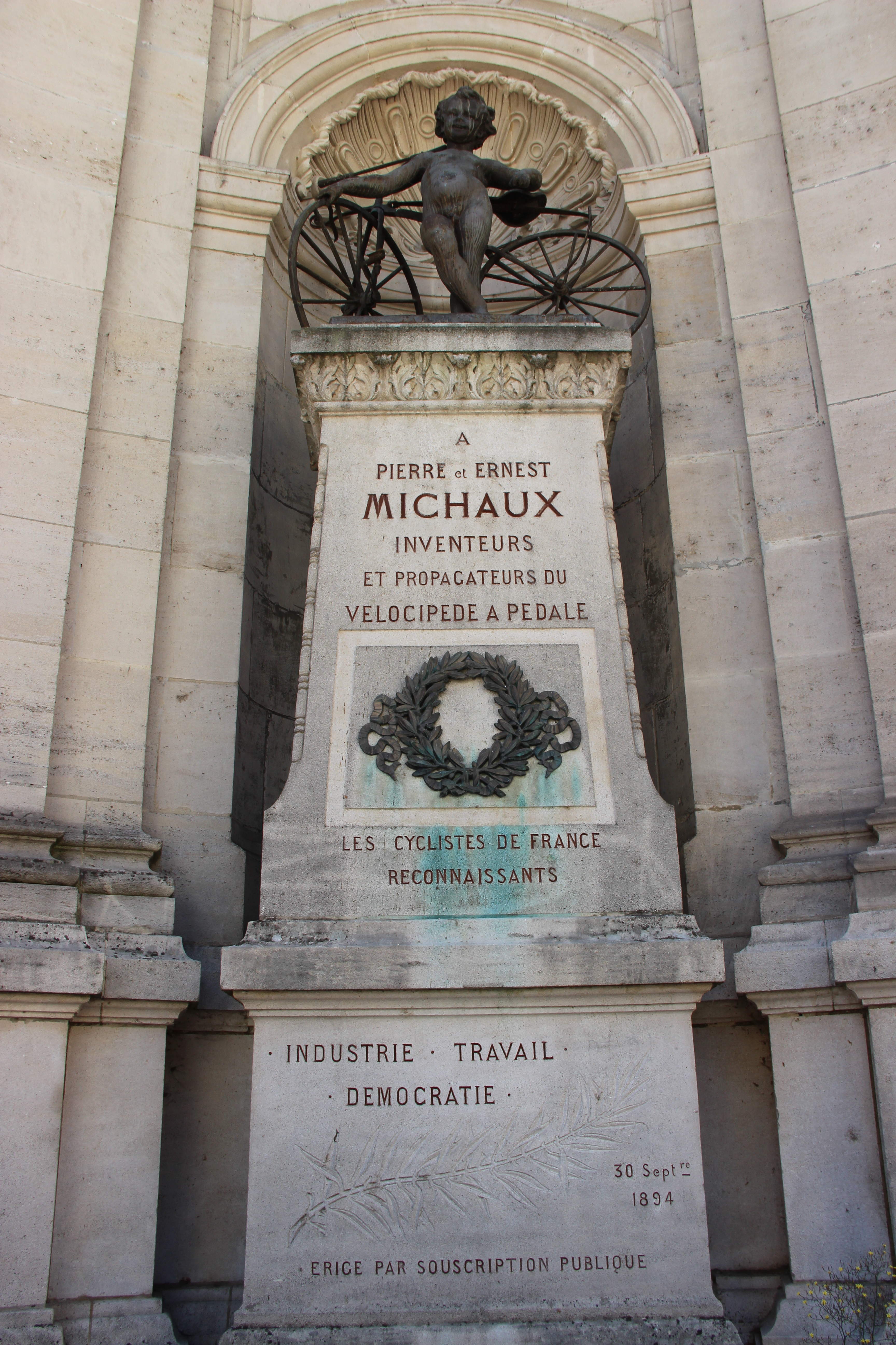 Le monument à Pierre et Ernest Michaux, natifs de Bar-le-Duc et inventeurs du vélocipède à pédales.